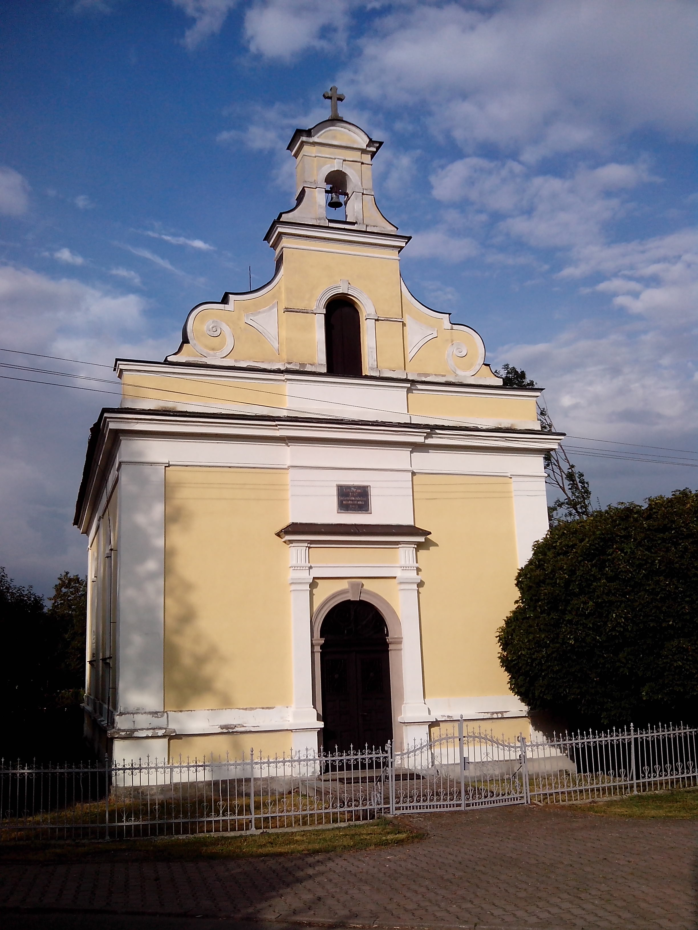 Kostel Panny Marie Bolestné (Semechnice)